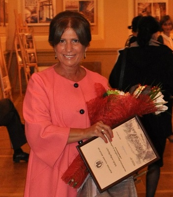 საპატიო თბილისელი - 2011